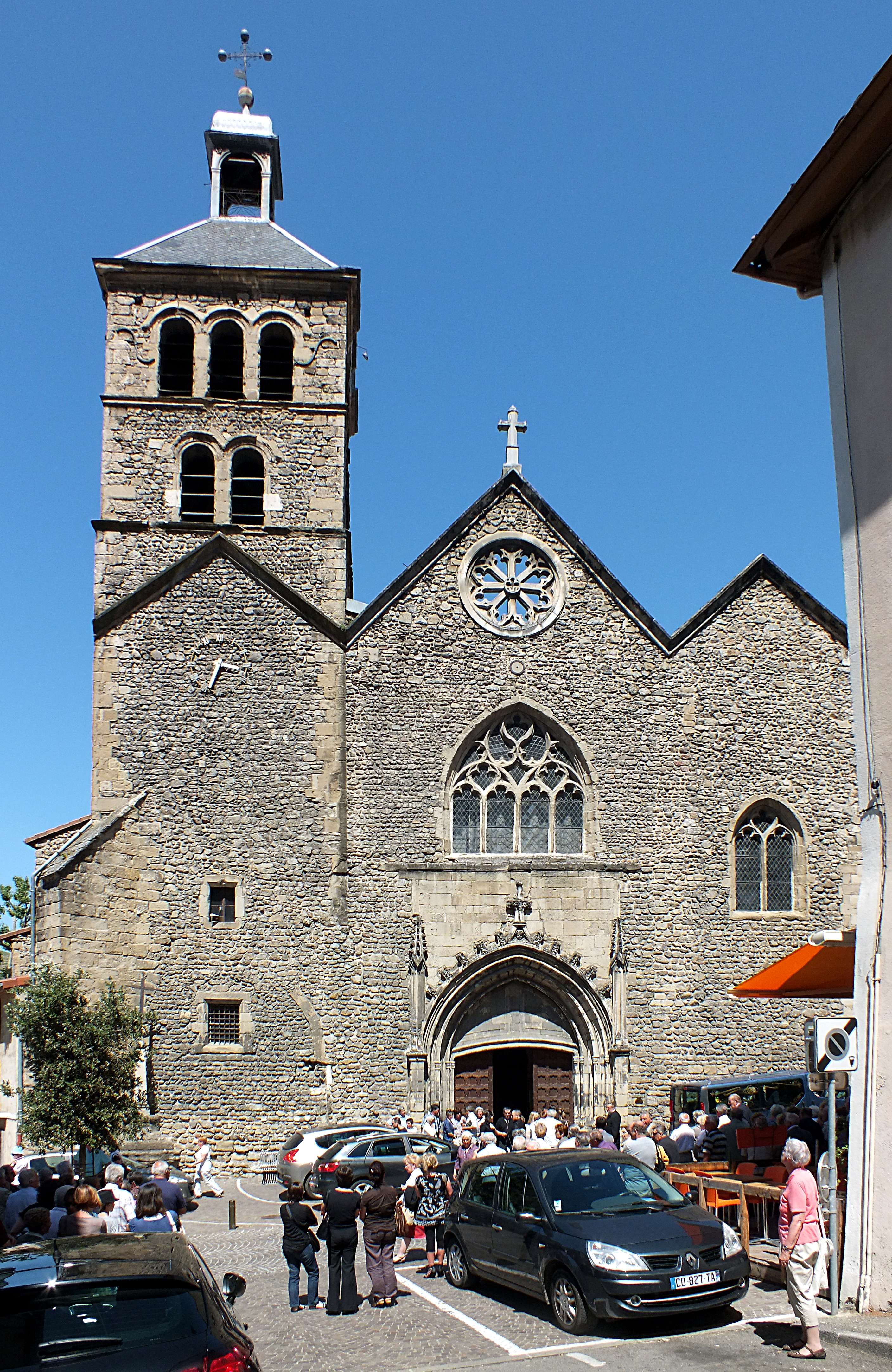 Tournon-sur-Rhône, Kirche St Julien (Heiliger Julianus)